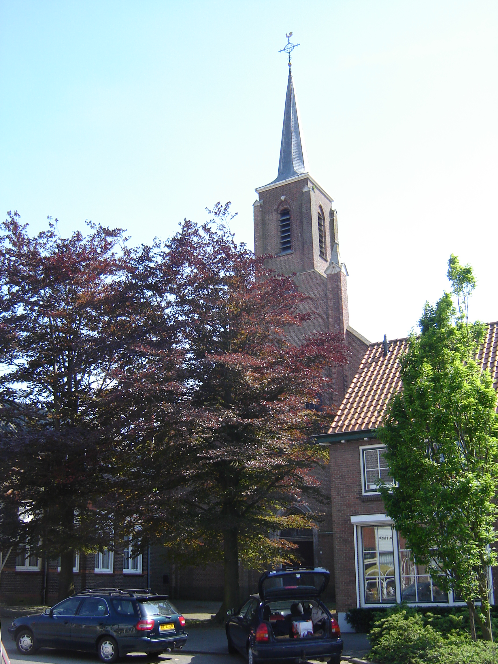 Rooms-Katholieke Sint-Eligiuskerk in Hoofdplaat. Roman Catholic Church of Saint Eligius in Hoofdplaat. Hoofdplaat, Sluis, Zeeland, Netherlands